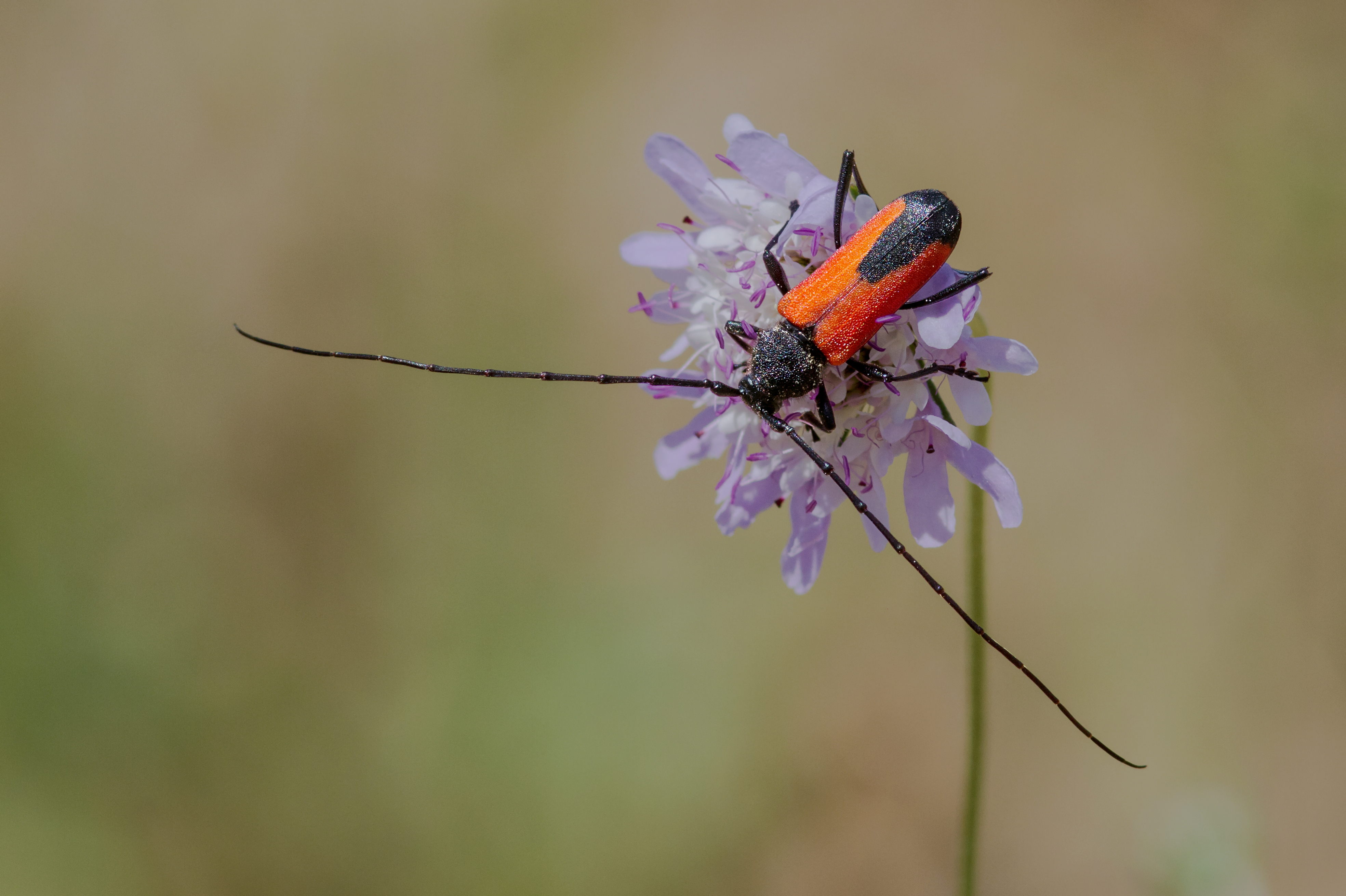 Purpuricène du chêne vert. Cerambicidae